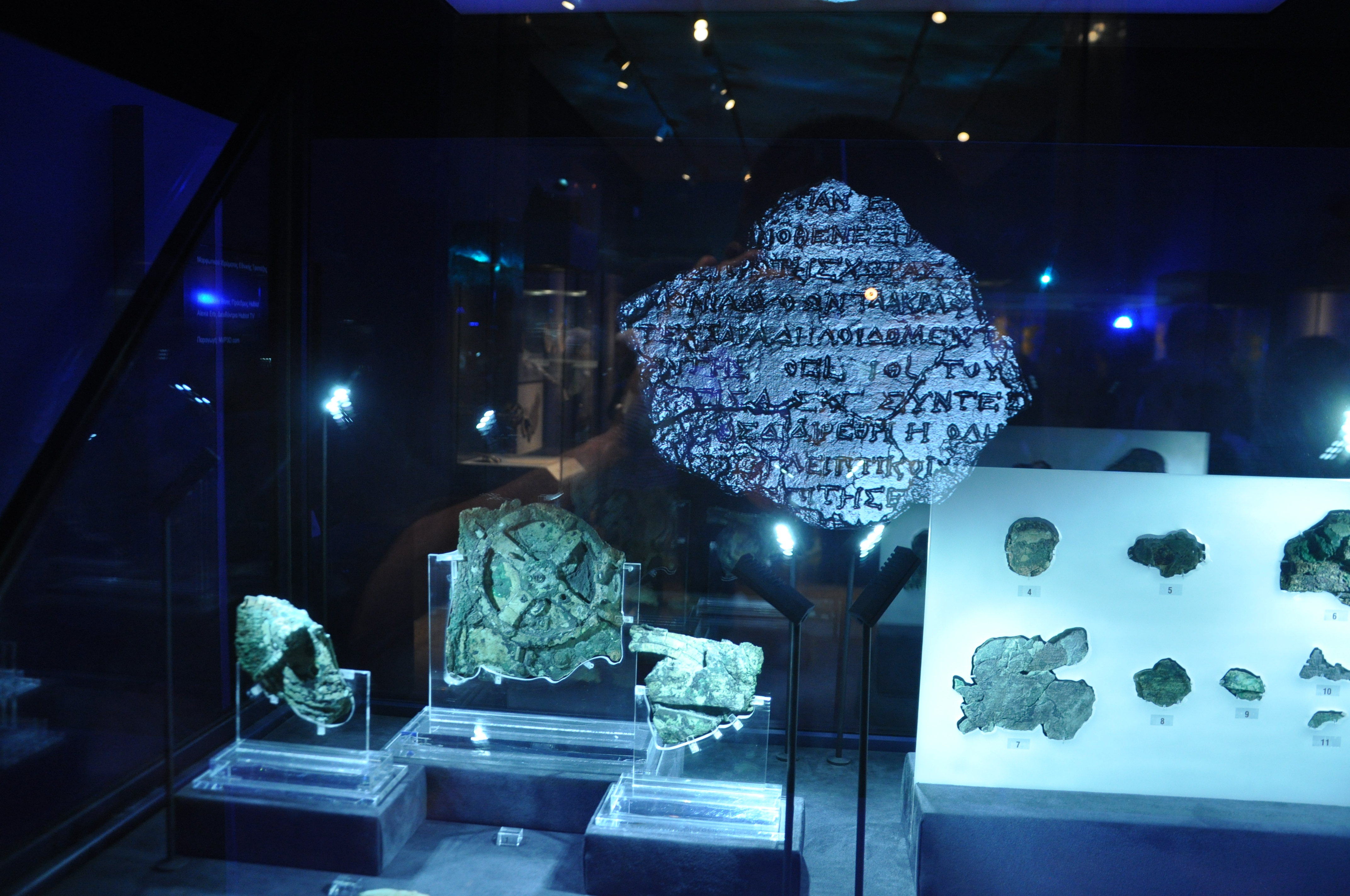 Przykład (1) prezentacji mechanizmu z Antikythiry - przedmioty pojawiające się w górnej części gabloty są holograficznymi, silnie powiększonymi, co kilkanaście sekund zmieniającymi się zdjęciami kolejnych przekrojów urządzenia. Pierwsze ze zdjęć tej serii znajdziesz tutaj Materiał: amatorska, odręczna fotografia ekspozycji w Narodowym Muzeum Archeologicznym w Atenach.